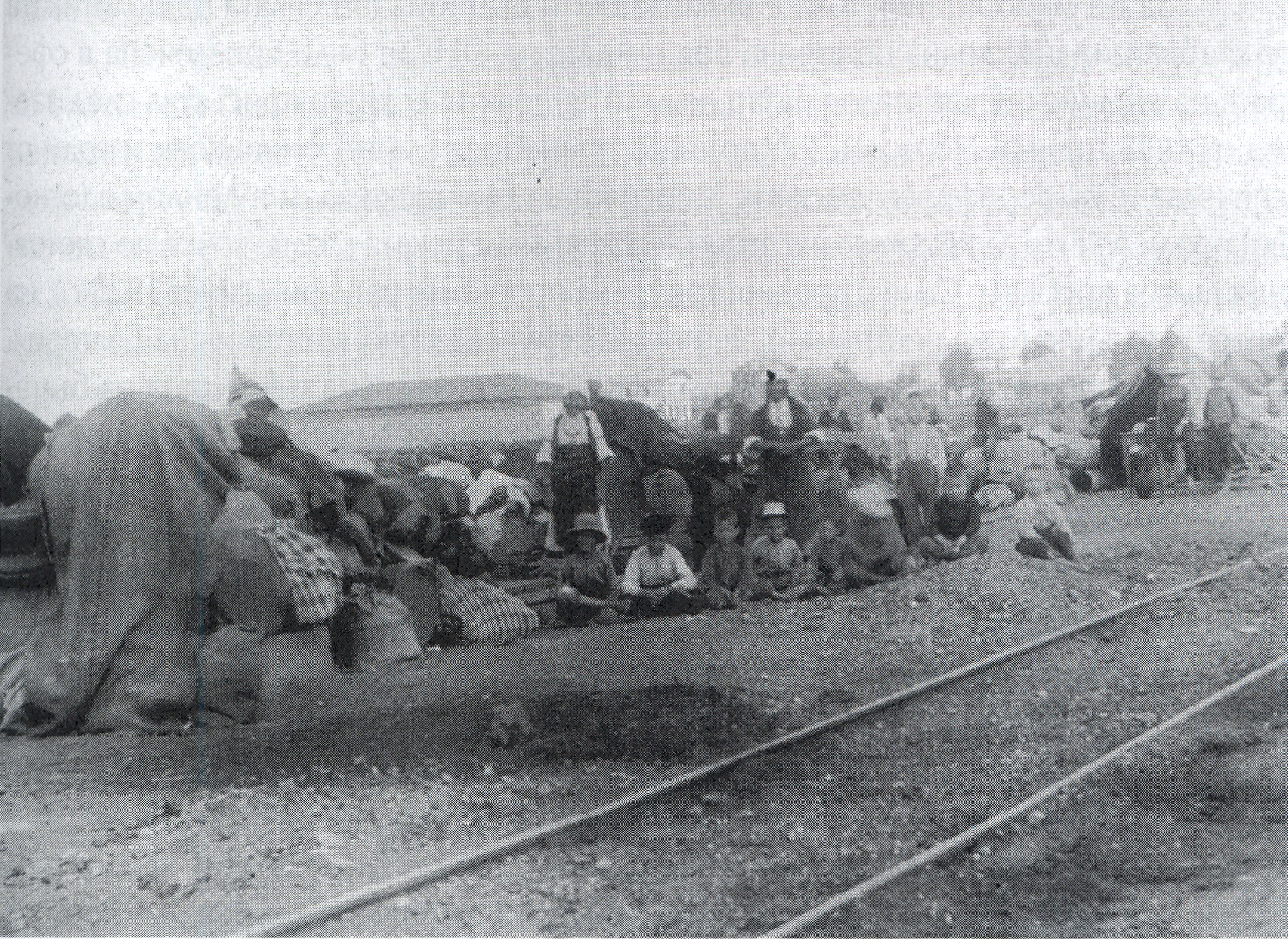 Български бежанци от Западна Тракия на гара Свиленград